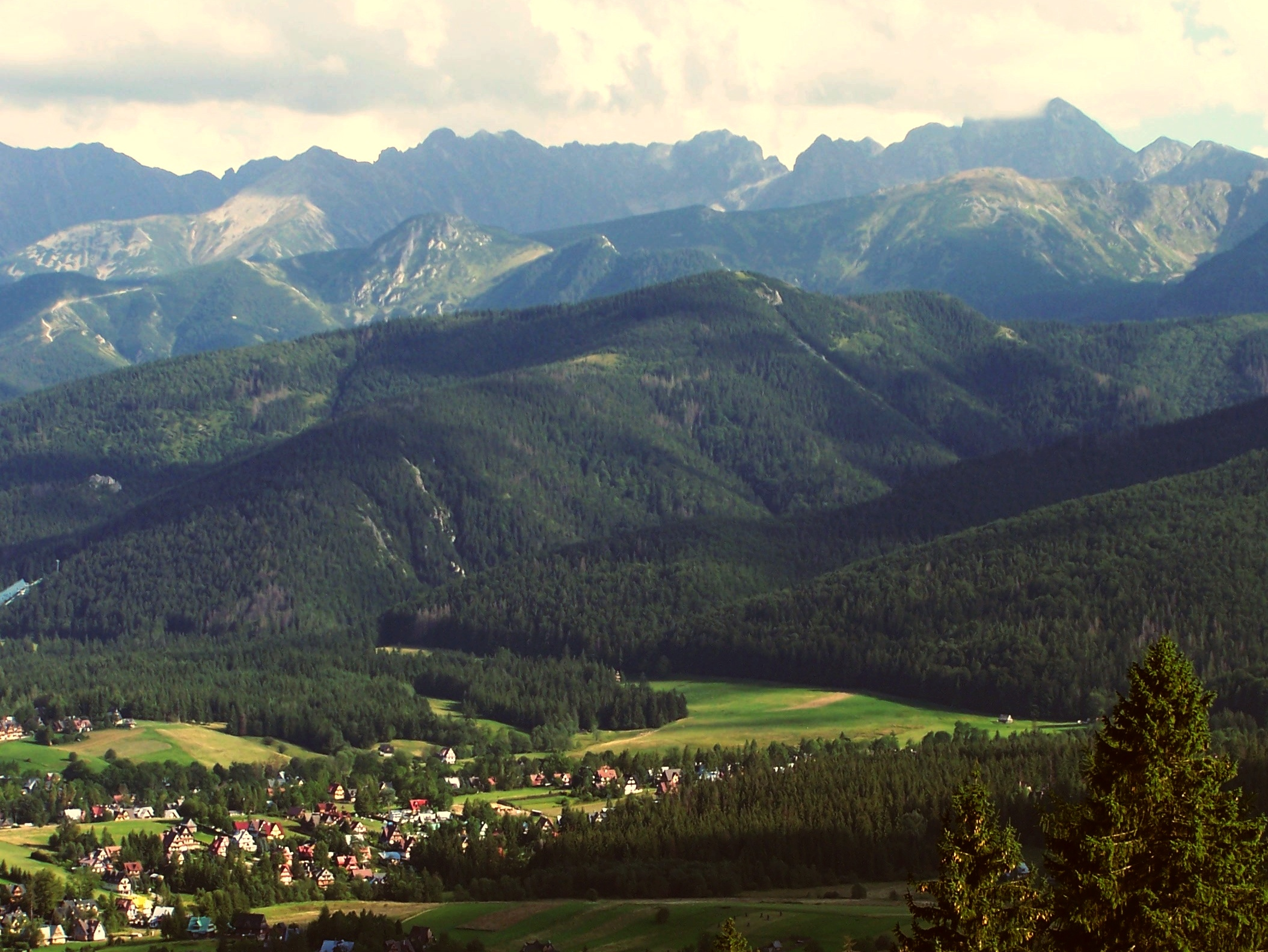 Widok z Pogórza Gubałowskiego